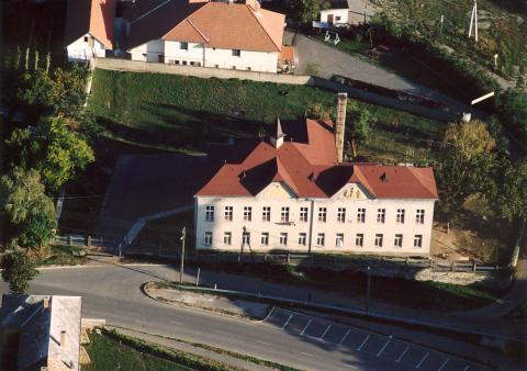 Olaszliszka, Hungary, aerialphotography